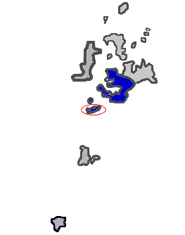 Hujing Island (circled) in Magong City, Penghu (the Pescadores), Taiwan (from )